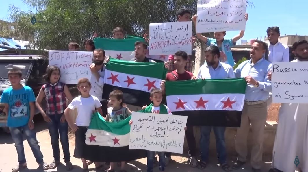 Manifestation à Khan Cheikhoun contre les attaques chimiques, le 12 mai 2015.